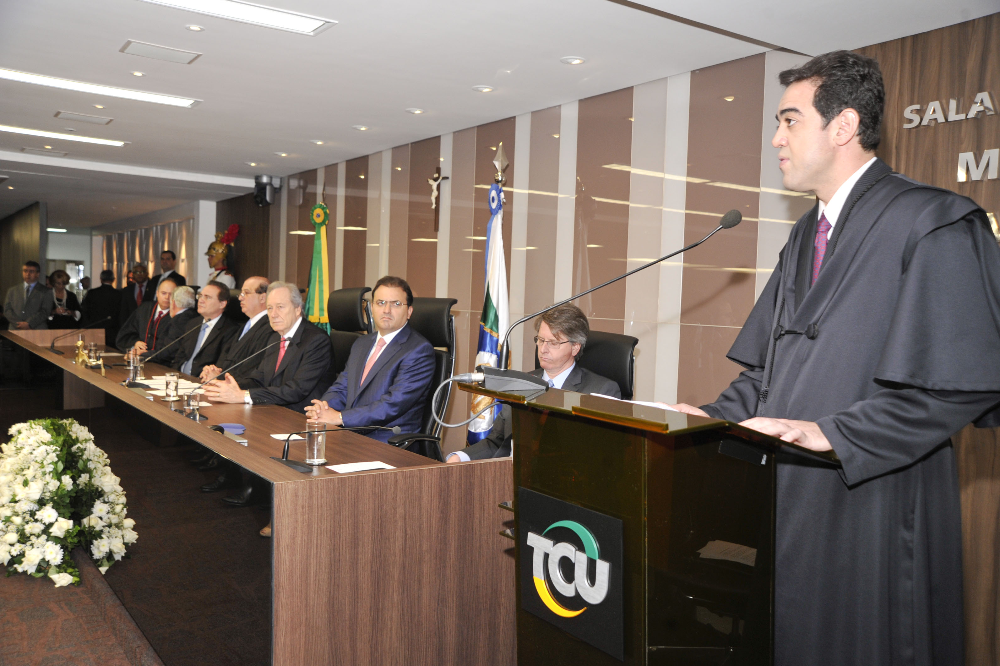 Cerimônia de posse do Consultor Legislativo Bruno Dantas no cargo de ministro do Tribunal de Contas da União (TCU). Participam: presidente do Senado Federal, senador Renan Calheiros (PMDB-AL); presidente do TCU, ministro Augusto Nardes; ministro do STF, Ricardo Lewandowski; presidente do Conselho Federal da OAB, Marcus Vinícius Furtado Coêlho Foto: Geraldo Magela/Agência Senado